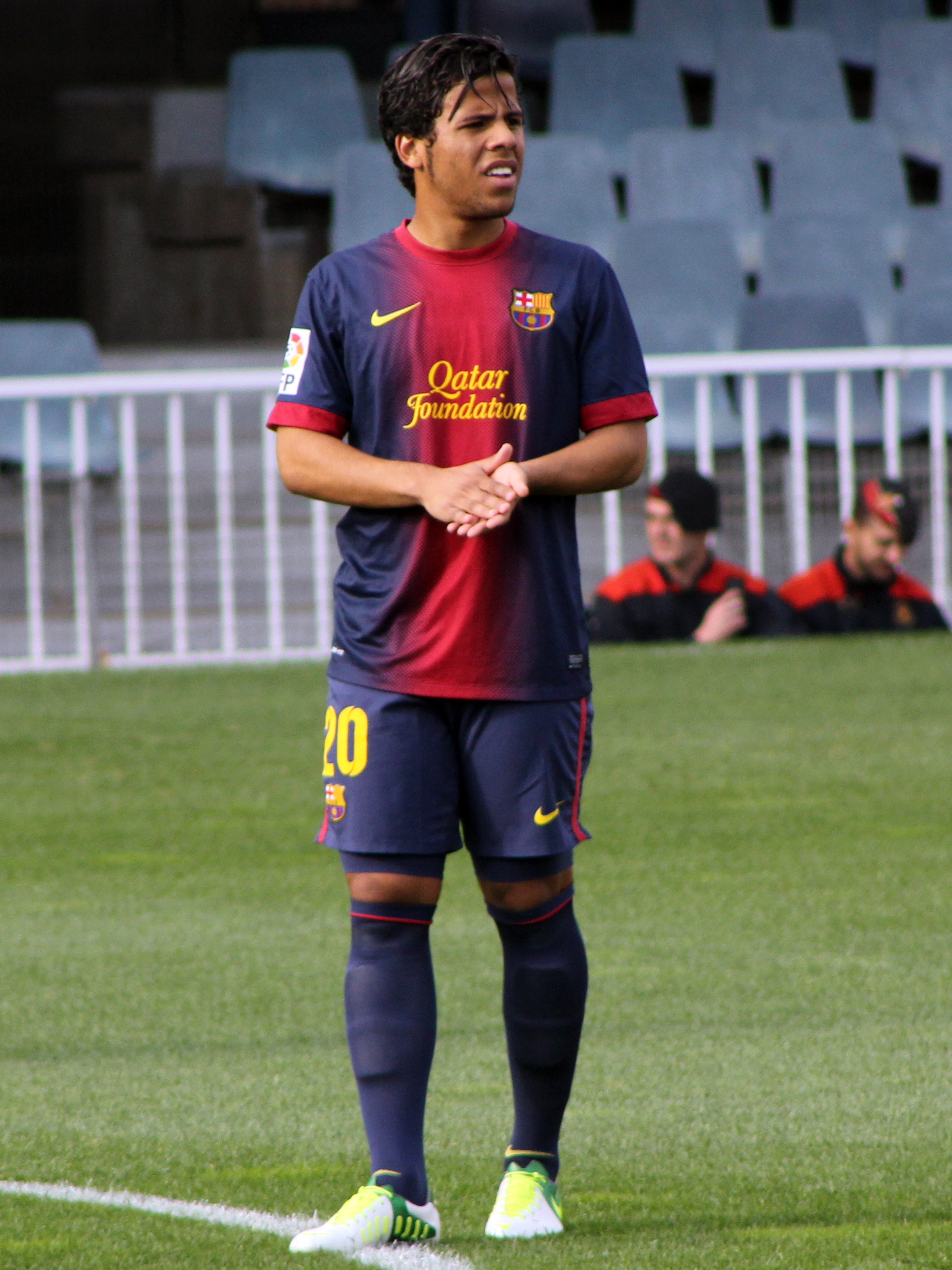 Jugador del FCB B en la temporada 2012-2013